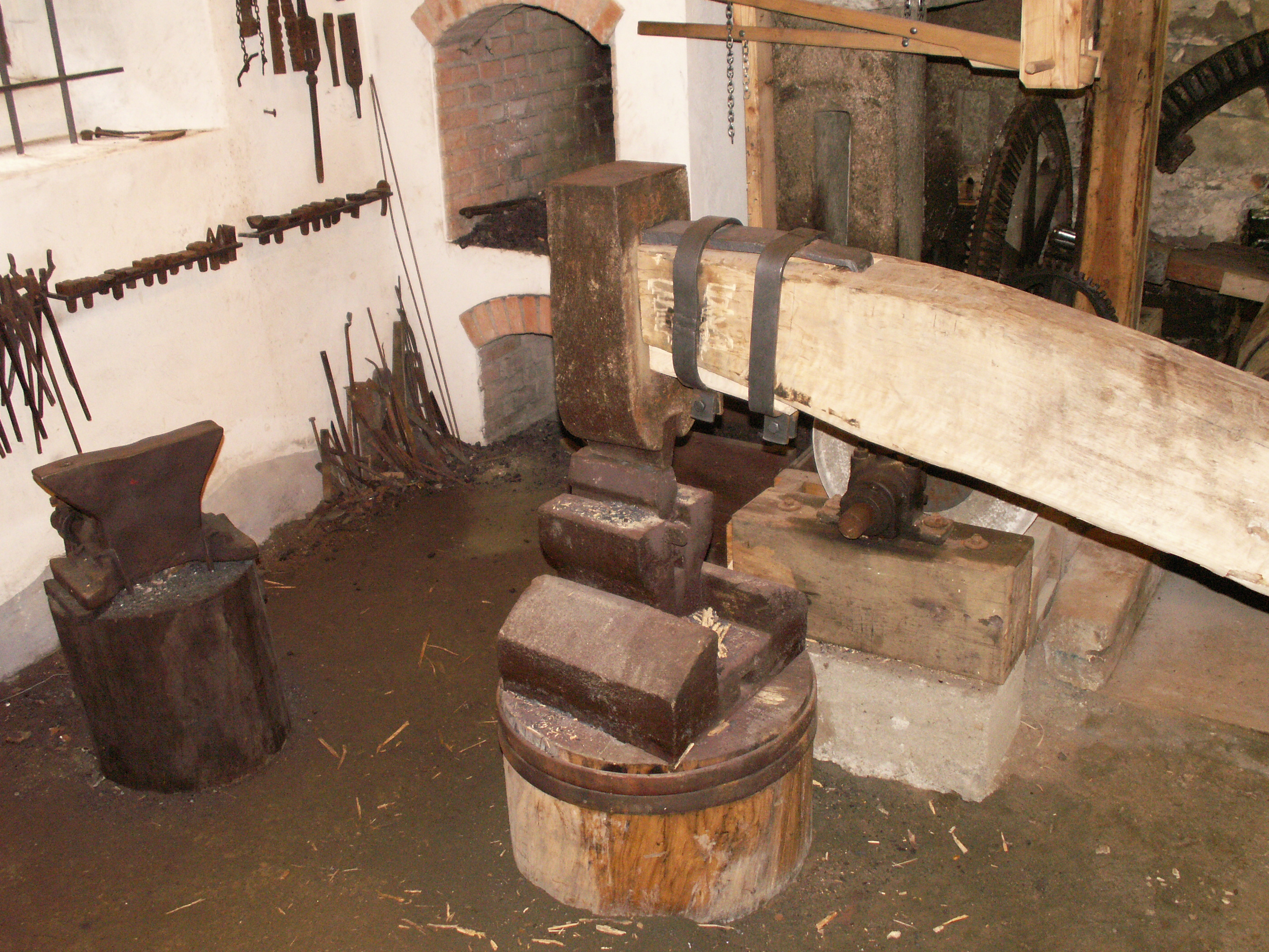 Expozice hamernictví upravená z bývalého Brdíčkova vodního mlýna, Šlakhamry čp. 222 (západně od osady Najdek)